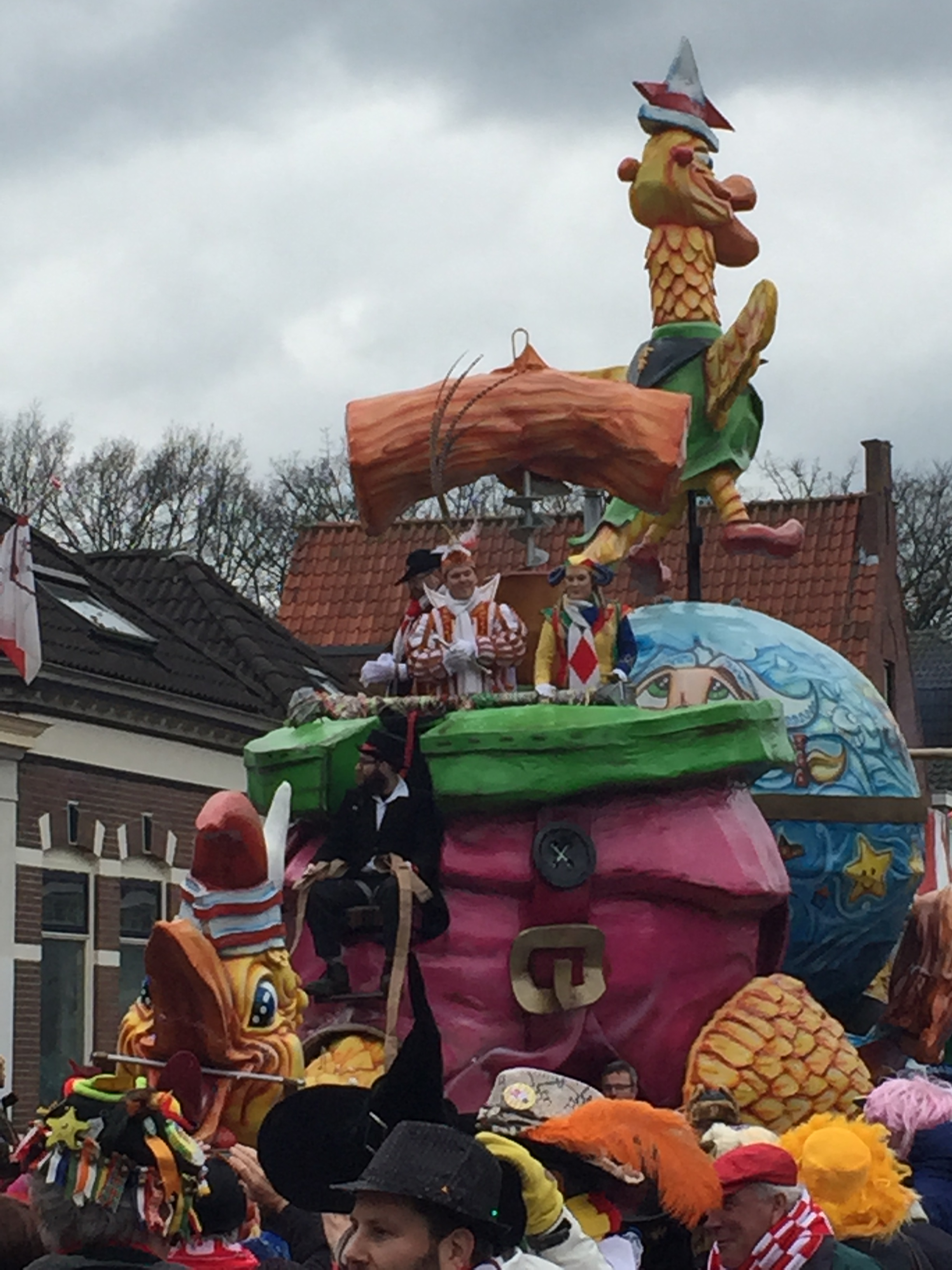 Optocht in Tullepetaonestad 2016